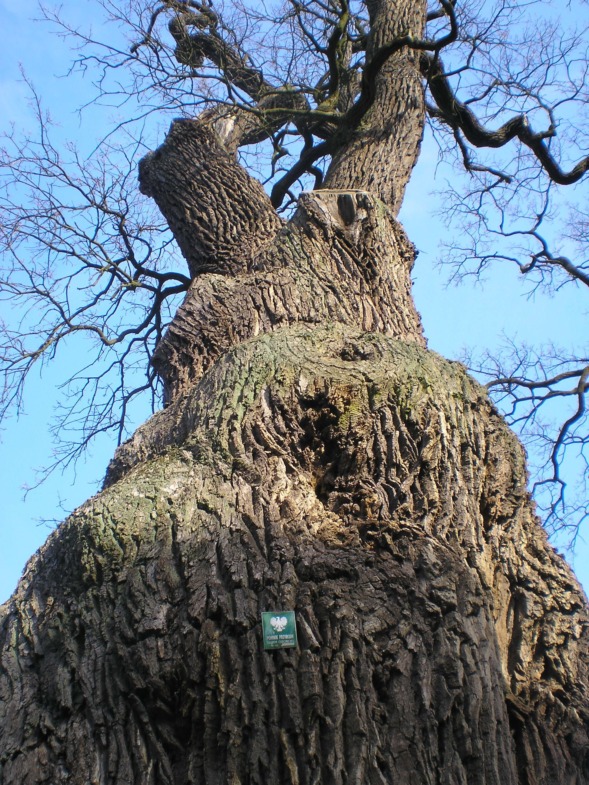 Korona Dębu Piotrowego w Toporowie